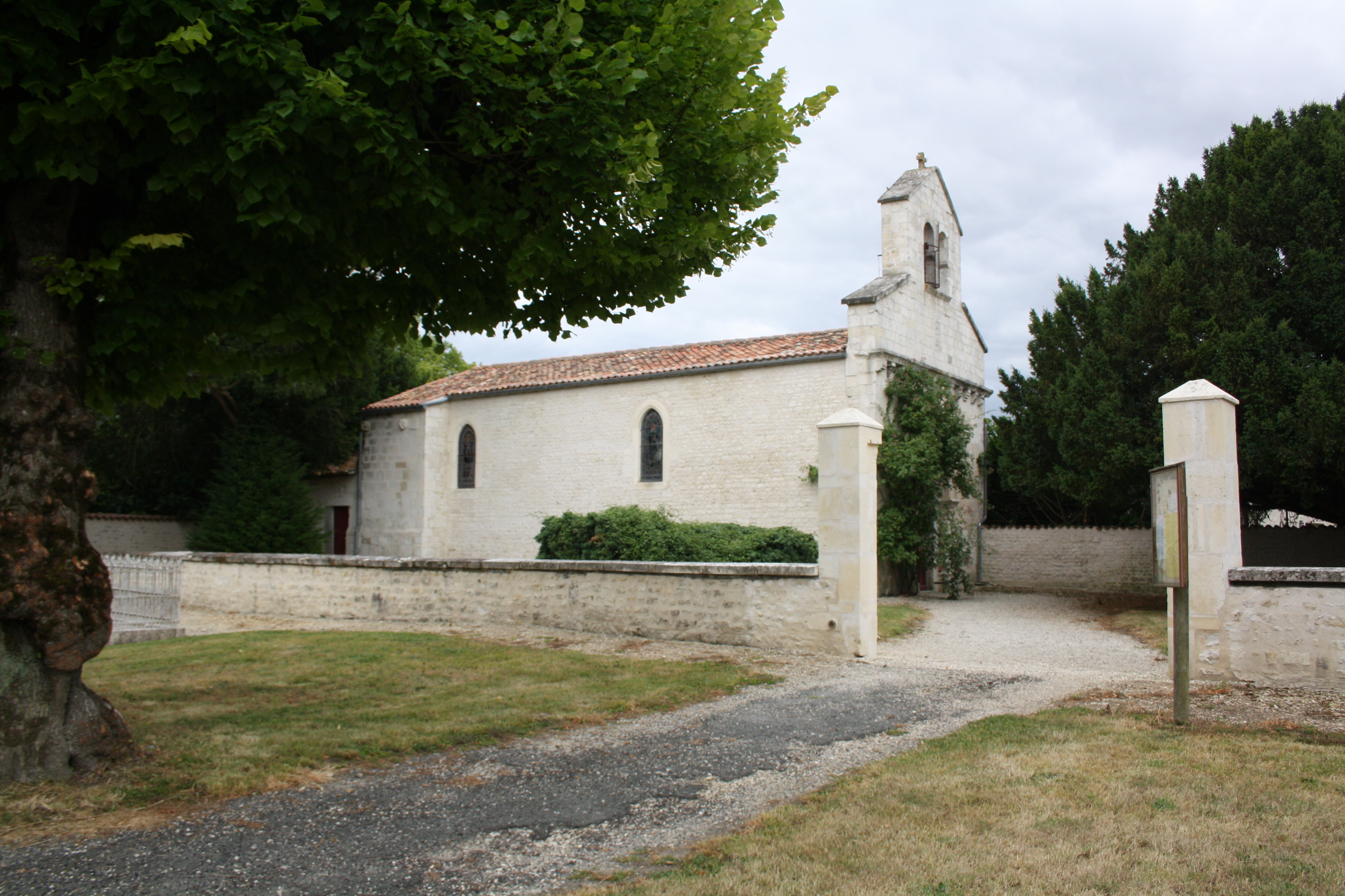 Église Saint-Laurent de Sainte-Même (Charente-Maritime, France).